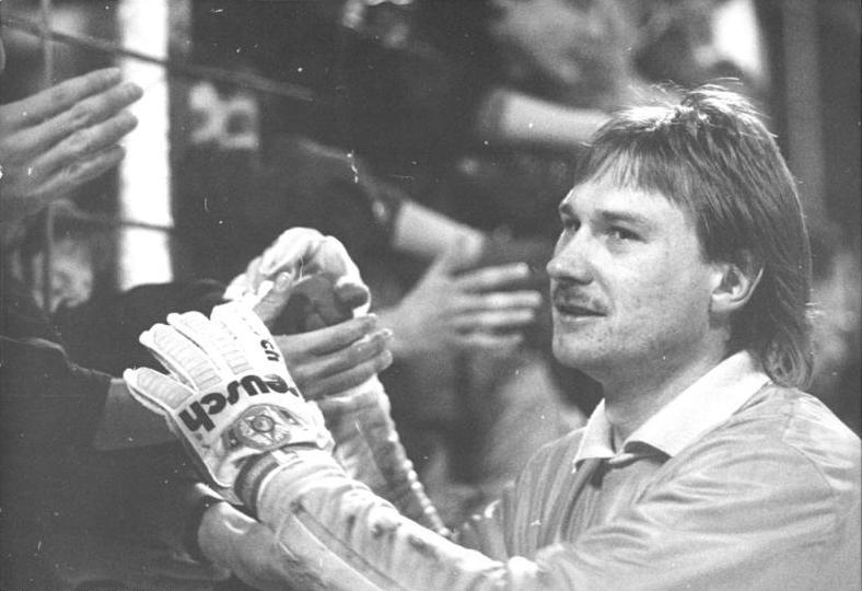 ADN- Jan-Peter Kasper 30.11.90- Jena: Fußball-Oberliga Nordost FC Carl Zeiss Jena - FC Energie Cottbus 2:0 (0:0)- Händeschütteln nach dem Spiel gegen Cottbus - nimmt der Jenanser Torhüter Perry Bräutigam Abschied von seinen hiesigen Fans ? Er wurde von Bundestrainer Berti Vogts für das Spiel der deutschen Nationalmannschaft gegen die Schweiz nominiert und beabsichtigt, den Thüringer Klub zu verlassen.